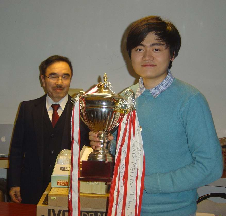 Fan Hui, Vainqueur pour la 5e fois du Paris Meijin en 2005